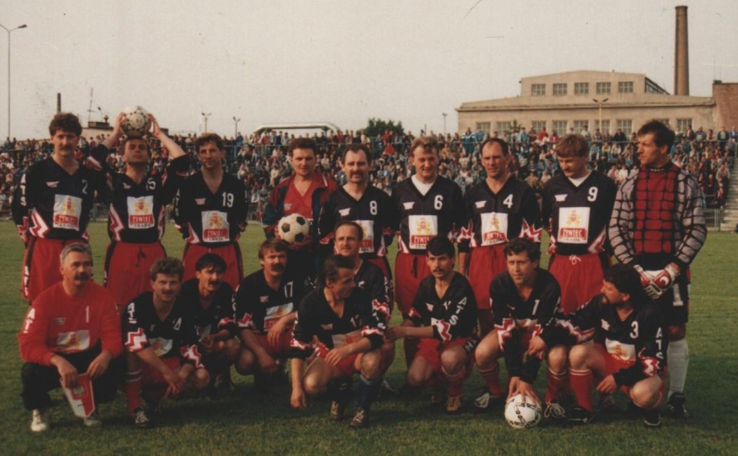 Stargardzcy oldboje w meczu z orłami Górskiego